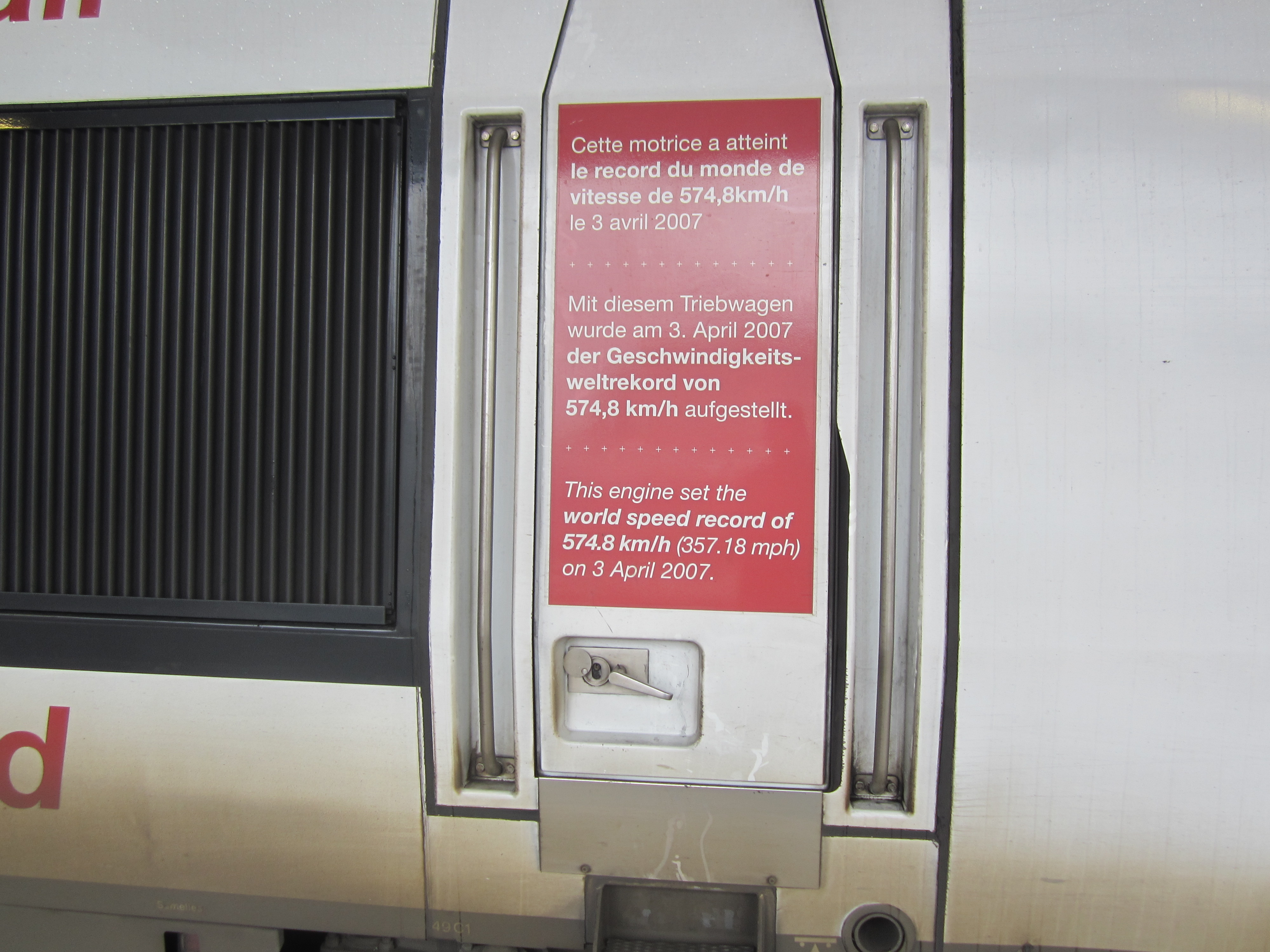 Autocollant sur la porte de cabine TGV POS n°4402 indiquant le record du monde de vitesse réalisé par cette motrice.